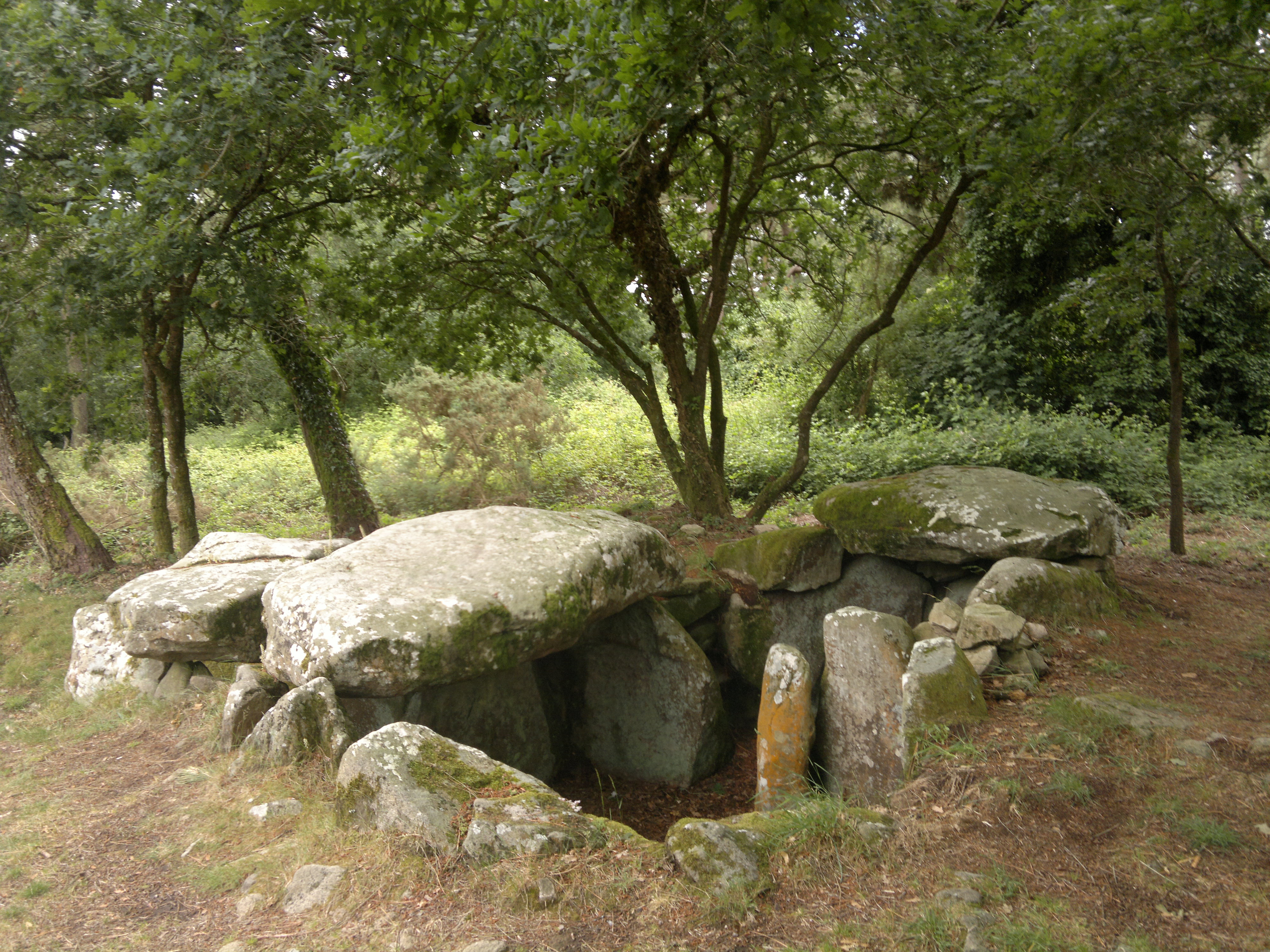 Dolmen de Kermarker, Fr-56-La Trinité-sur-Mer.